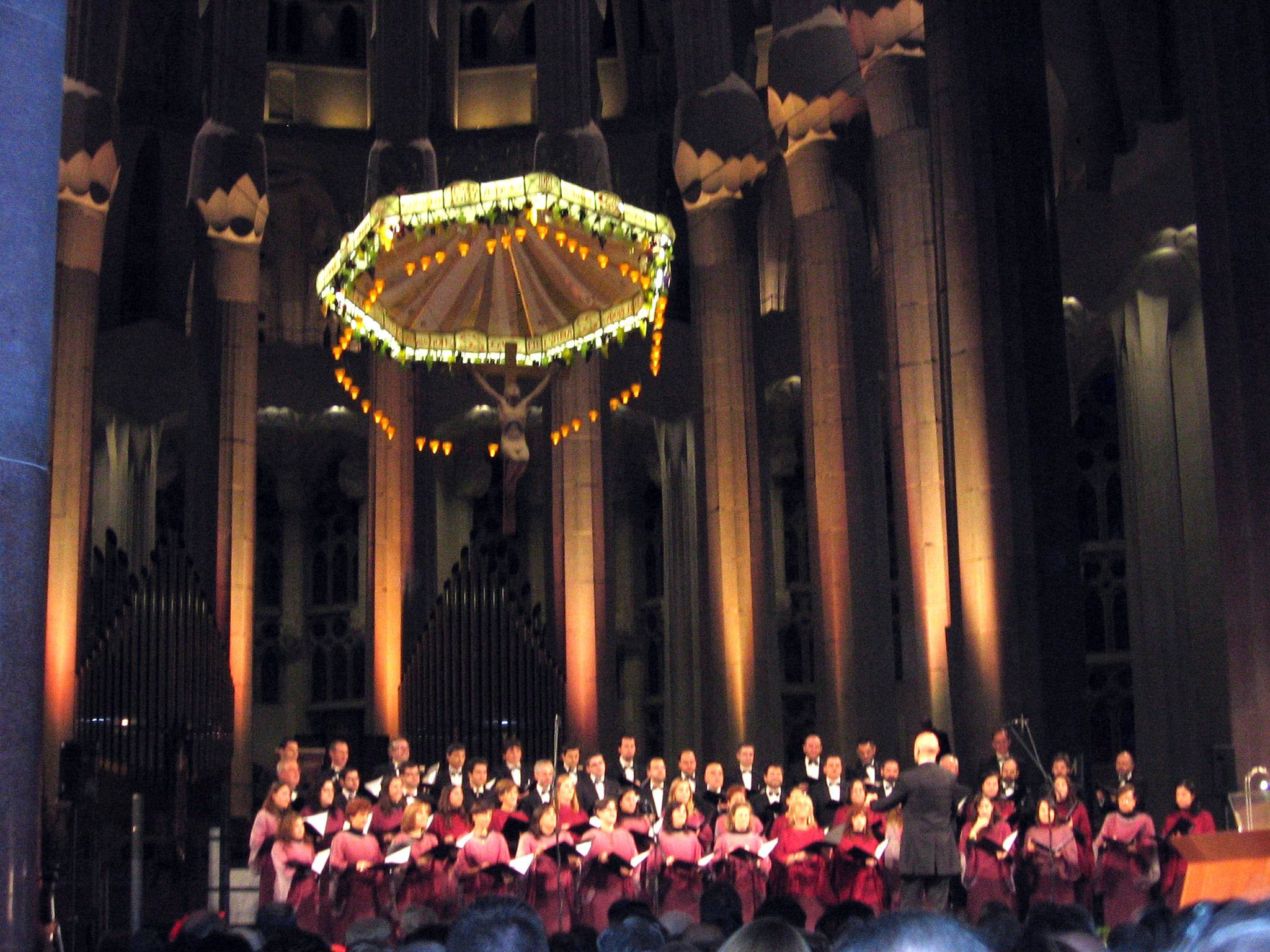 Concierto de Navidad en la Sagrada Familia (02-12-2012).